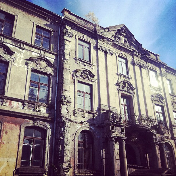 Здание восточно-прусской генеральной кредитной с/х дирекции (Калиниградская область, Калининград, улица Тюленина, 13)